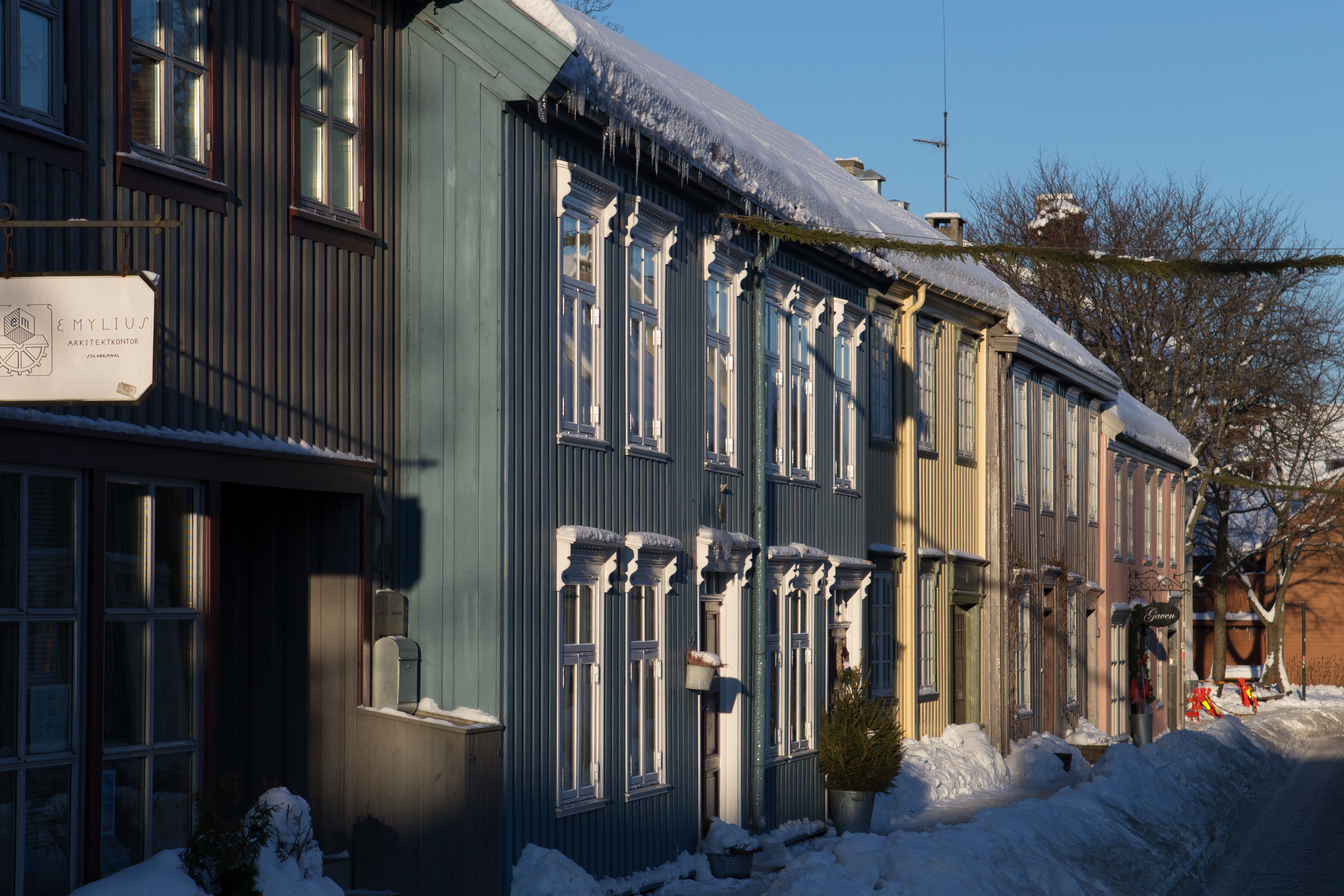 Gamle hus på Øvre Bakklandet vinteren 2019.